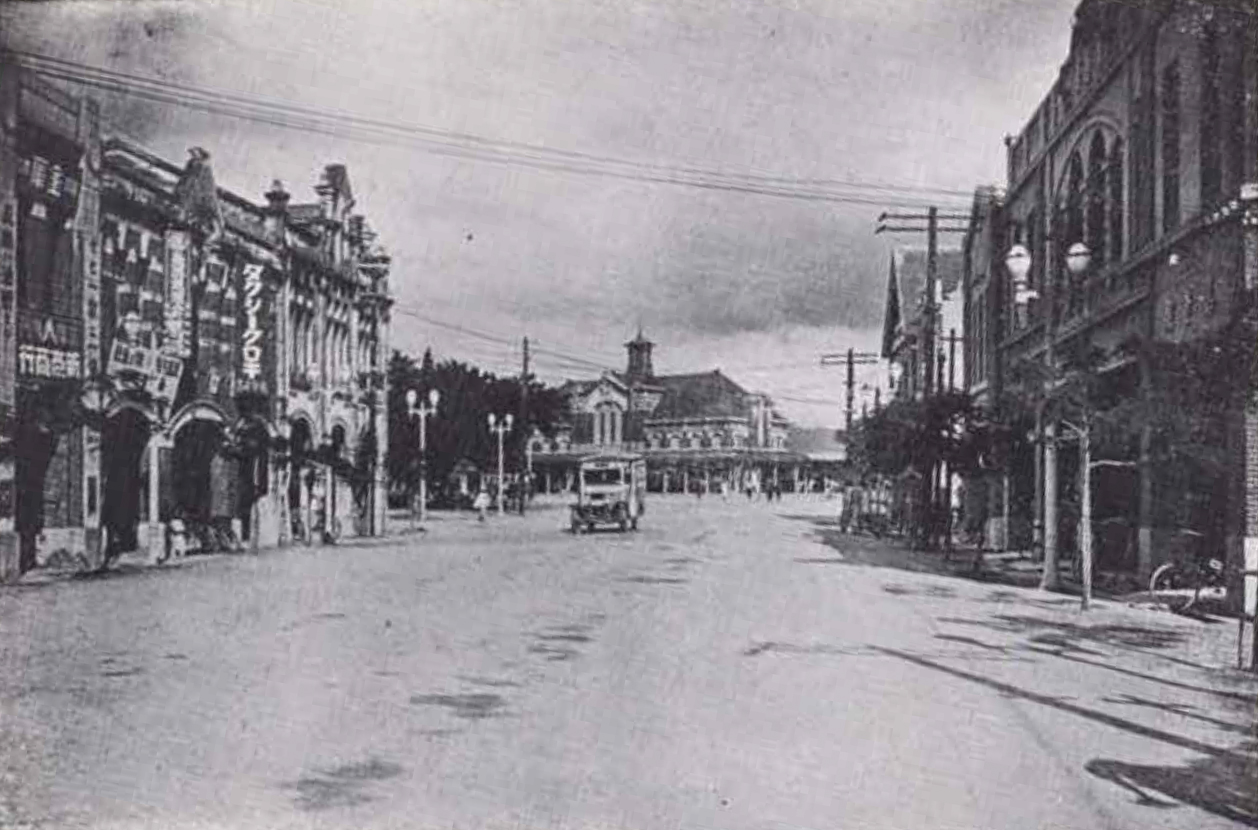 台中站前 (今中山路)